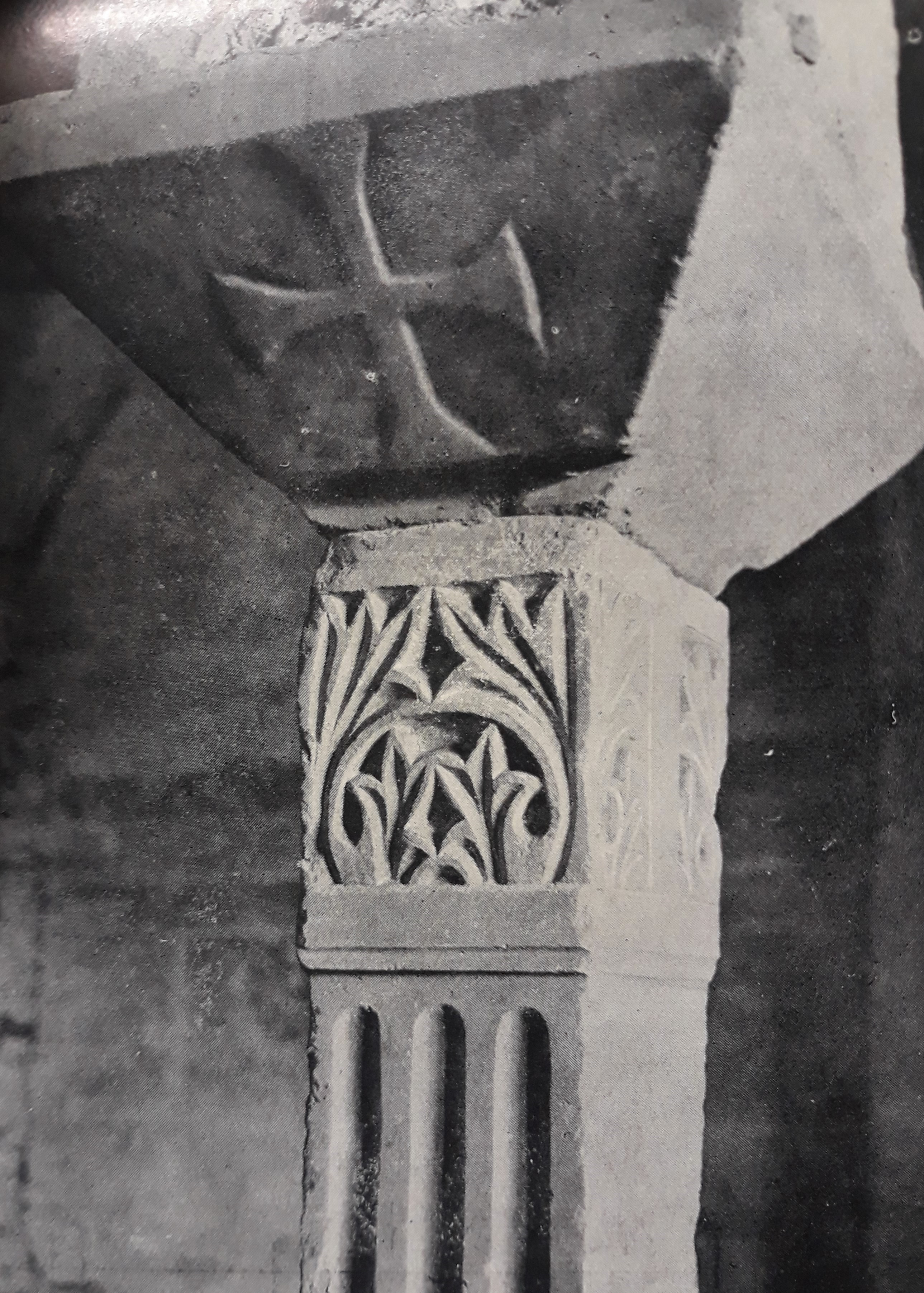 Capitello e pulvino del sacello di San Benedetto nell'abbazia di San Zeno a Verona